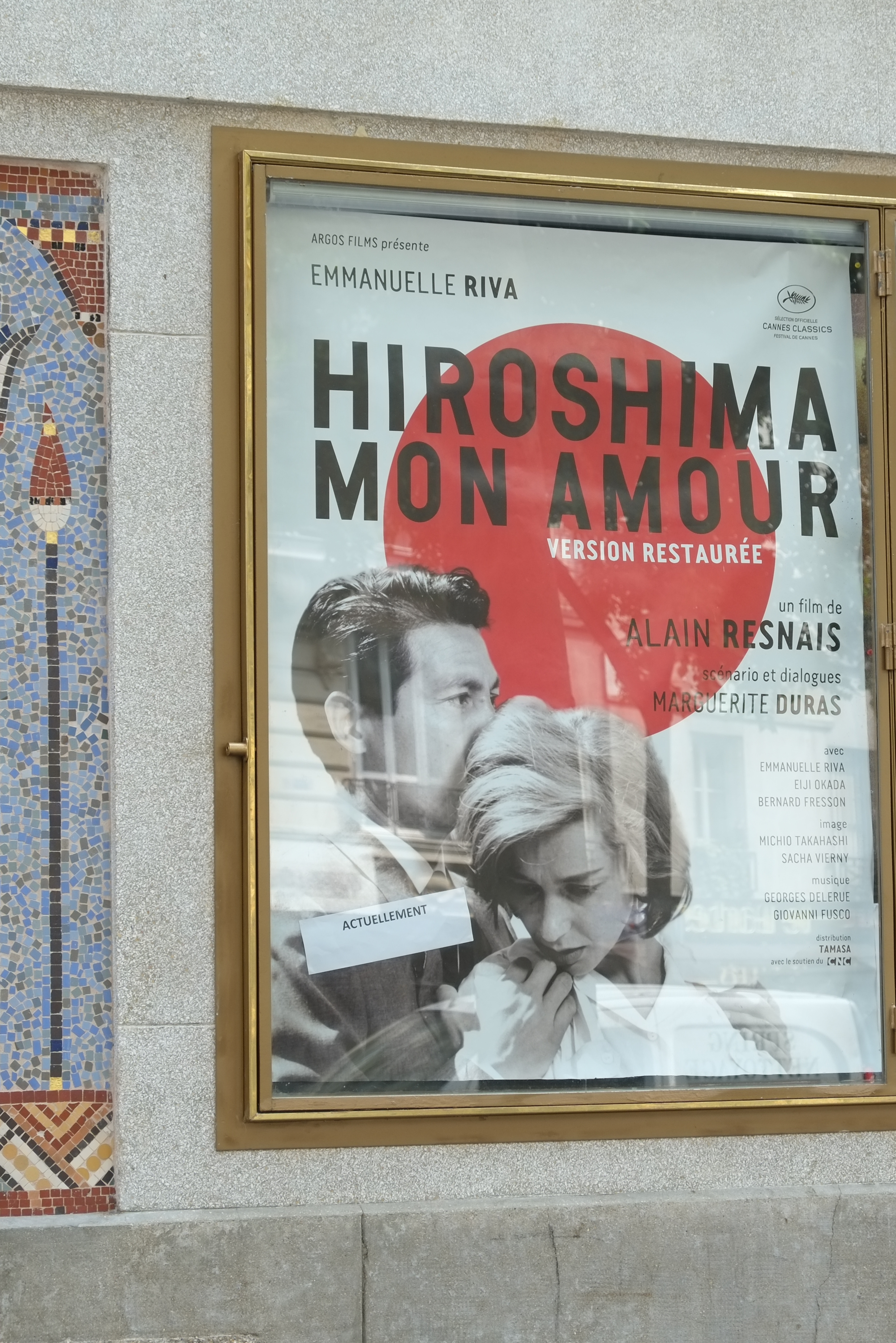 Kino Le Louxor in Paris, 170 boulevard Magenta/ boulevard de la Chapelle